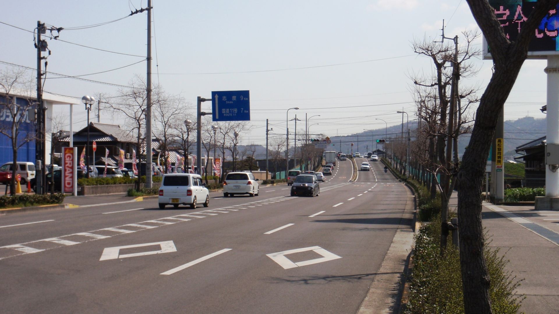 香川県高松市にある市道室町新田線の元山町付近から元山橋方向を見る。